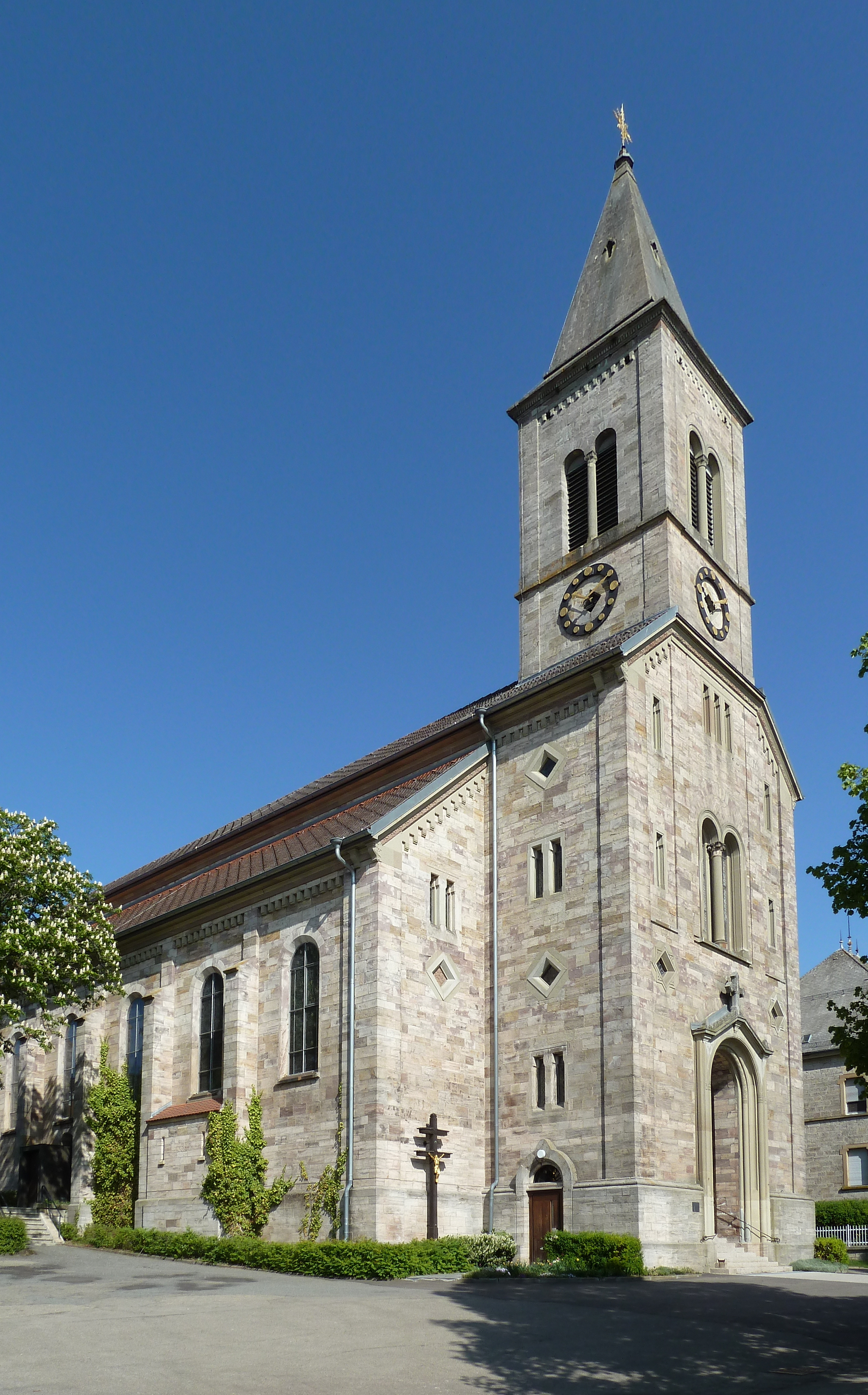 Kirche St. Peter und Paul in Bonndorf